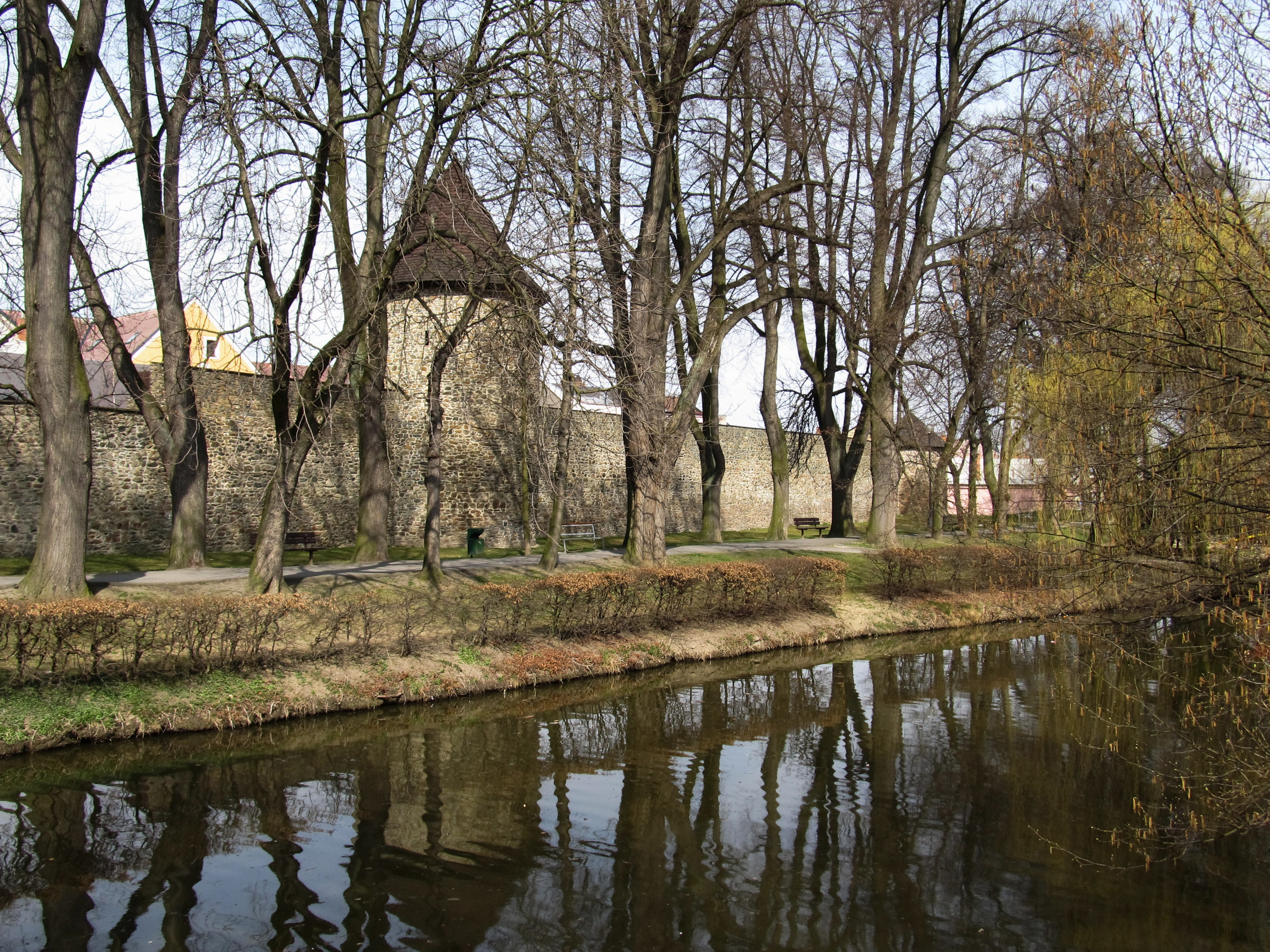 Pohled na hradby z městského parku přes Synský rybník.